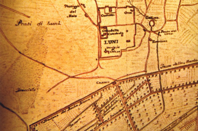 vista dei resti di Luni da pinata XVIII secolo